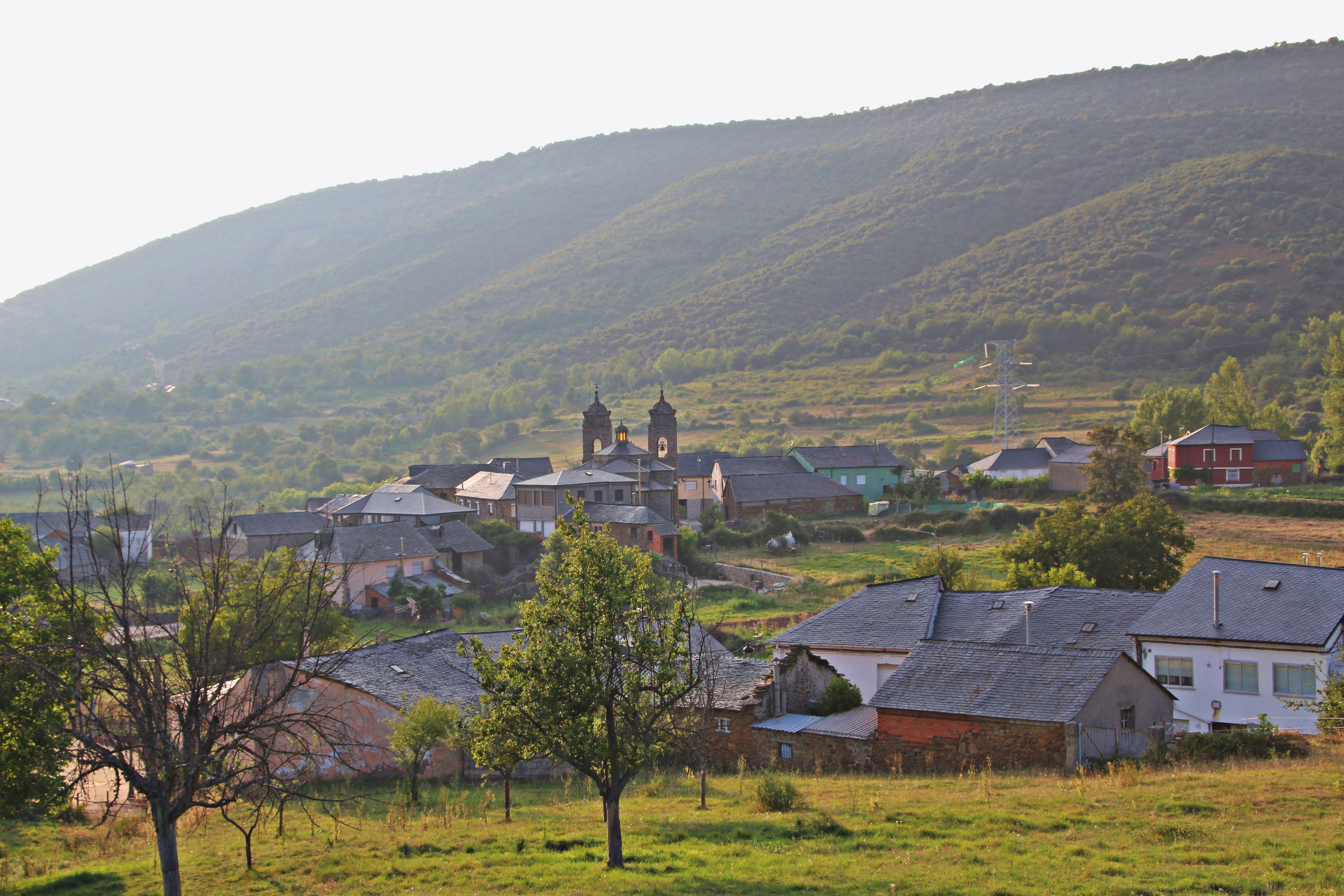 Langre, localidad de Berlanga del Bierzo, comarca de El Bierzo, provincia de León